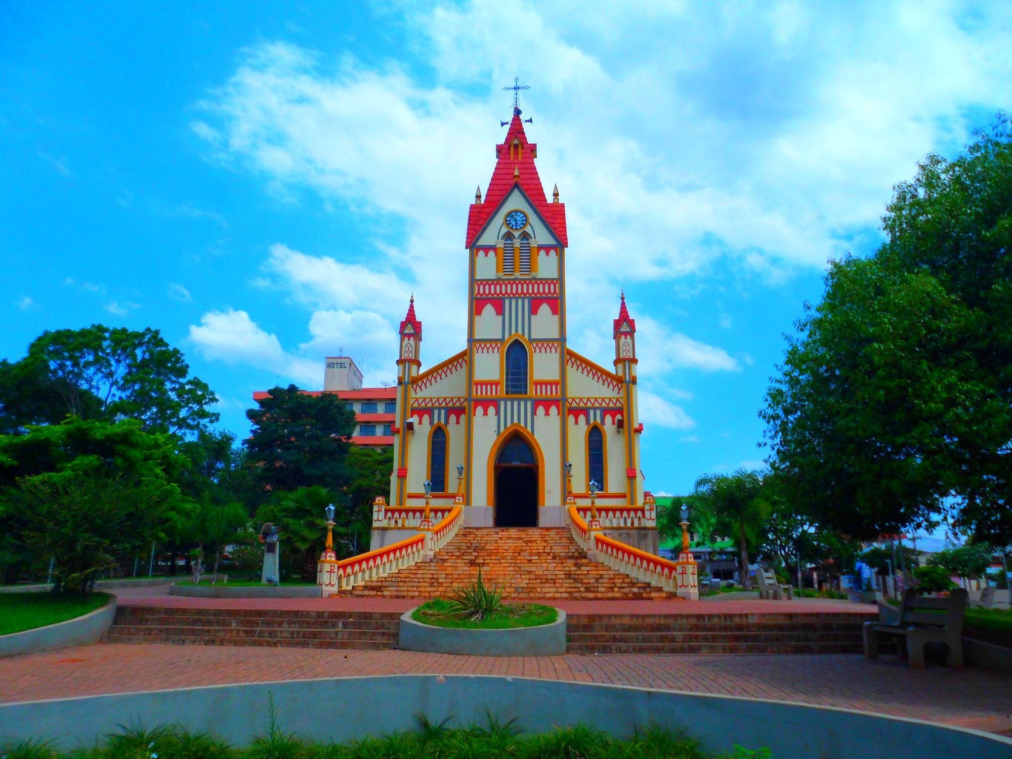 águas de sta barbara